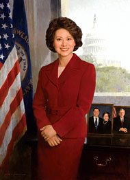 Elaine Chao